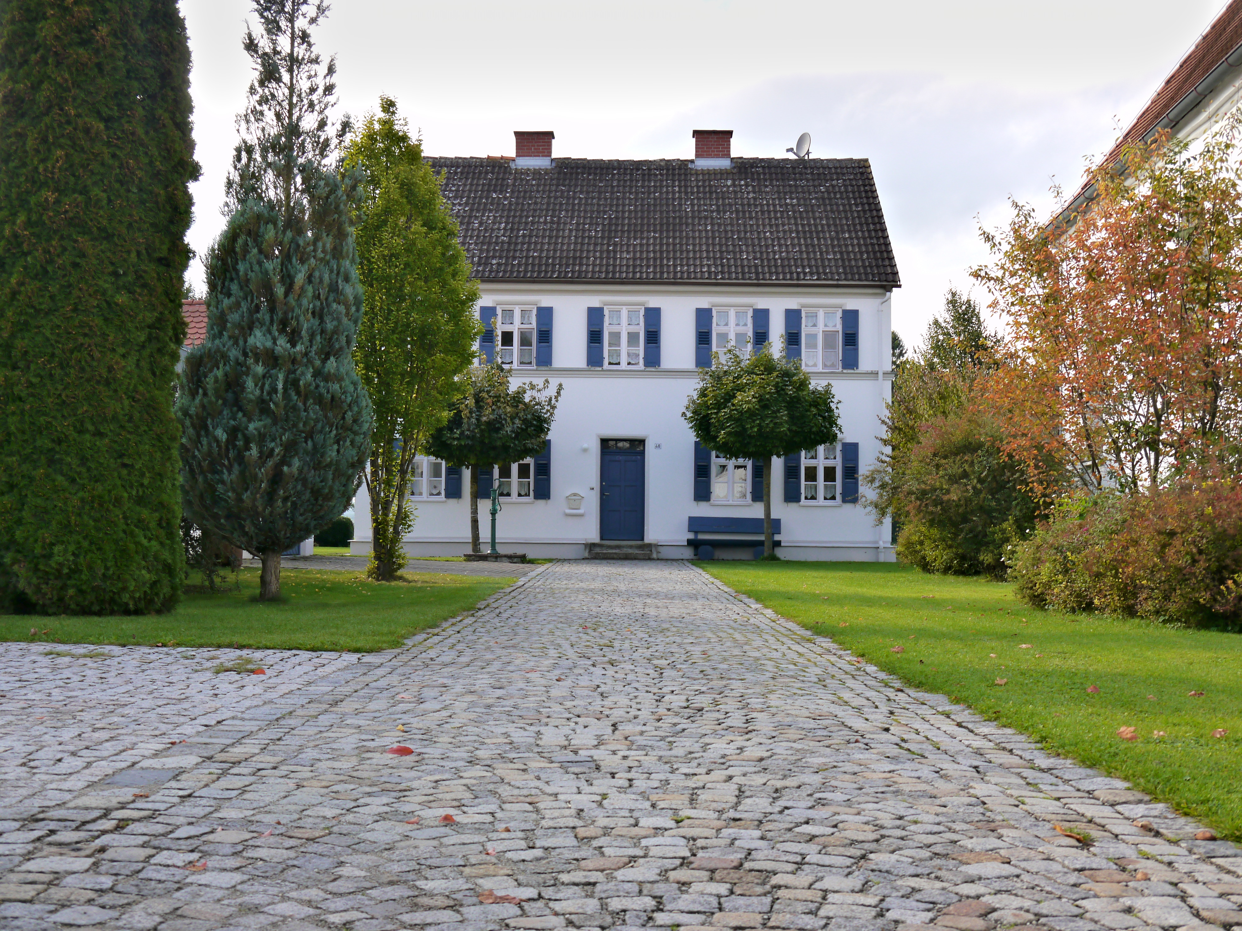 PfarrhausThis is a photograph of an architectural monument.